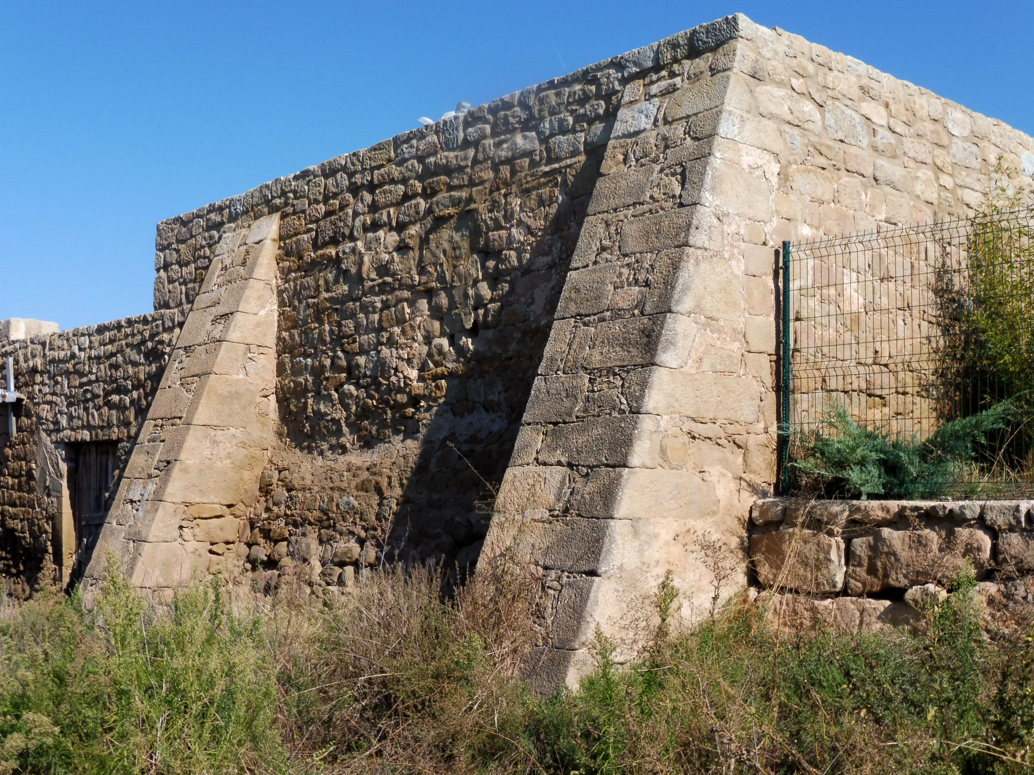 Soldevila (Montmajor): restes de l'antiga masia